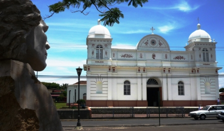 Escultura "Barvak" del escultor Favio Brenes en primer plano y el Templo Católico de Barva, vistos desde el Parque Central de Barva, Heredia, Costa Rica. Representa la efigie del cacique indígena Barvak que dominó este valle y de cuyo nombre deriva el nombre del pueblo de Barva.